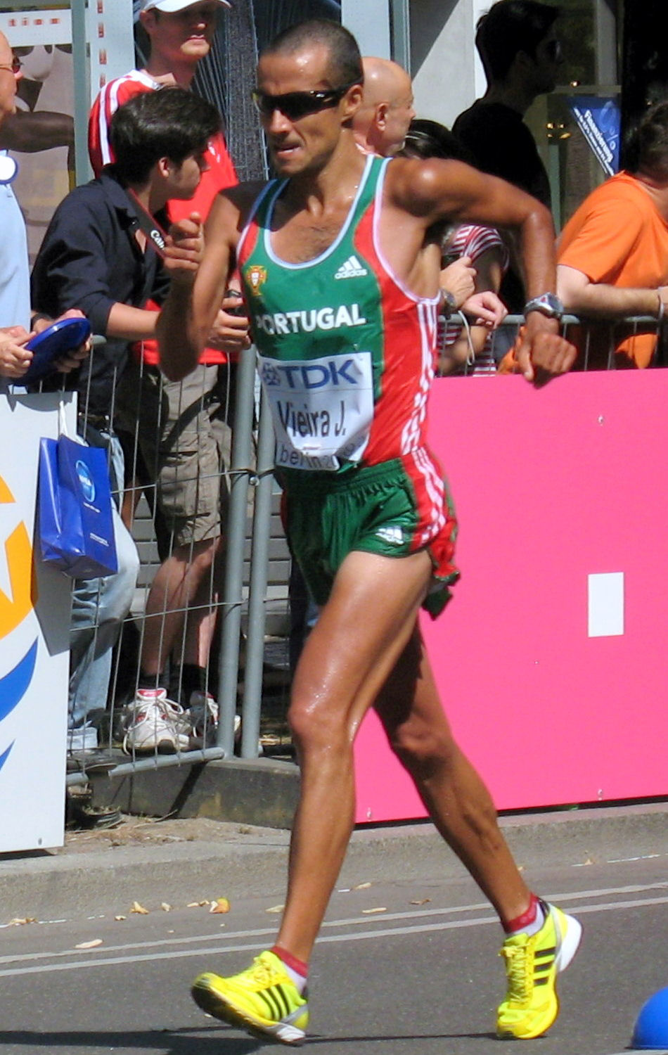 João Vieira, 15.08.2009